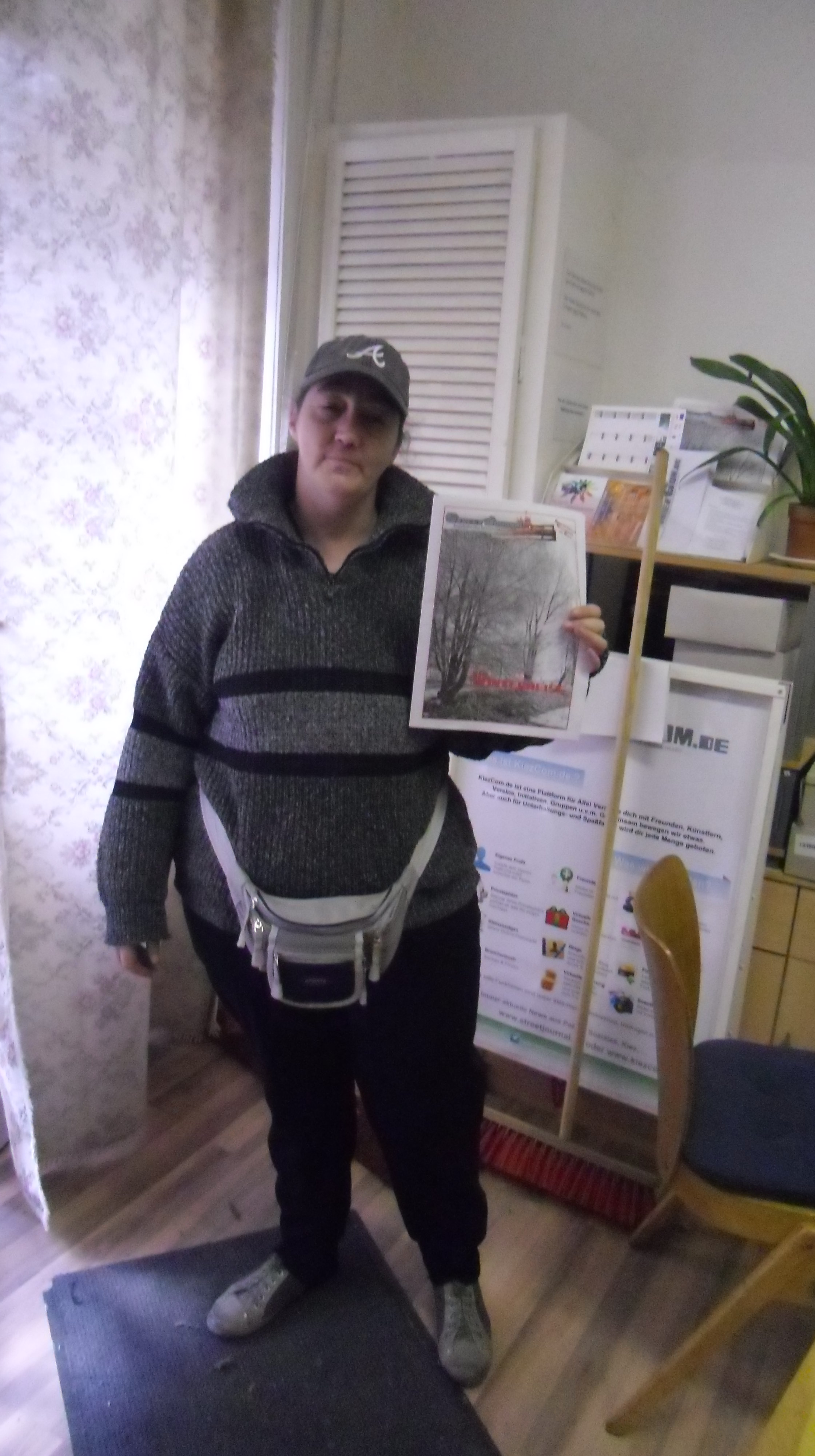 Straßenzeitungsverkäuferin des StreetJournal im SIZ